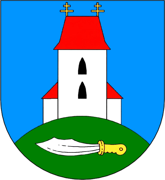 Česky: Rozhodnutím č. 17 předsedy Poslanecké sněmovny Parlamentu České republiky ze dne 18. března byl obci udělen znak a prapor. Předseda Poslanecké sněmovny Lubomír Zaorálek dne 6. června 2003 rozhodnutí o udělení znaku a praporu slavnostně předal obci.